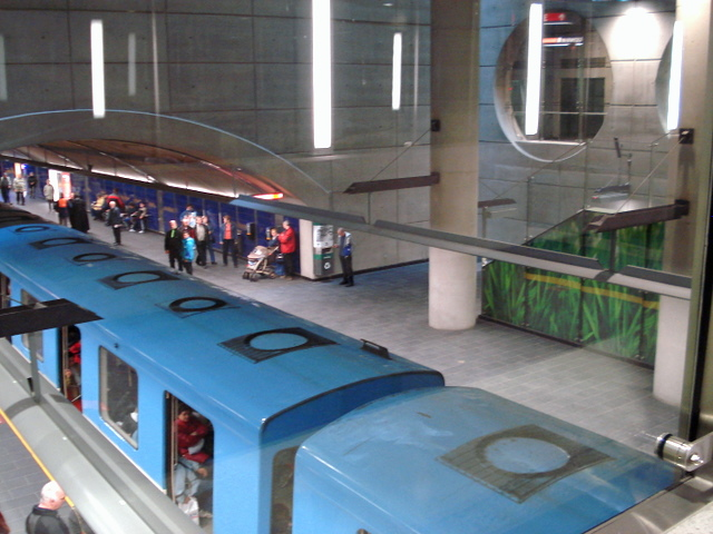 Station de métro de la Concorde à Laval / De la Concorde metro station in Laval